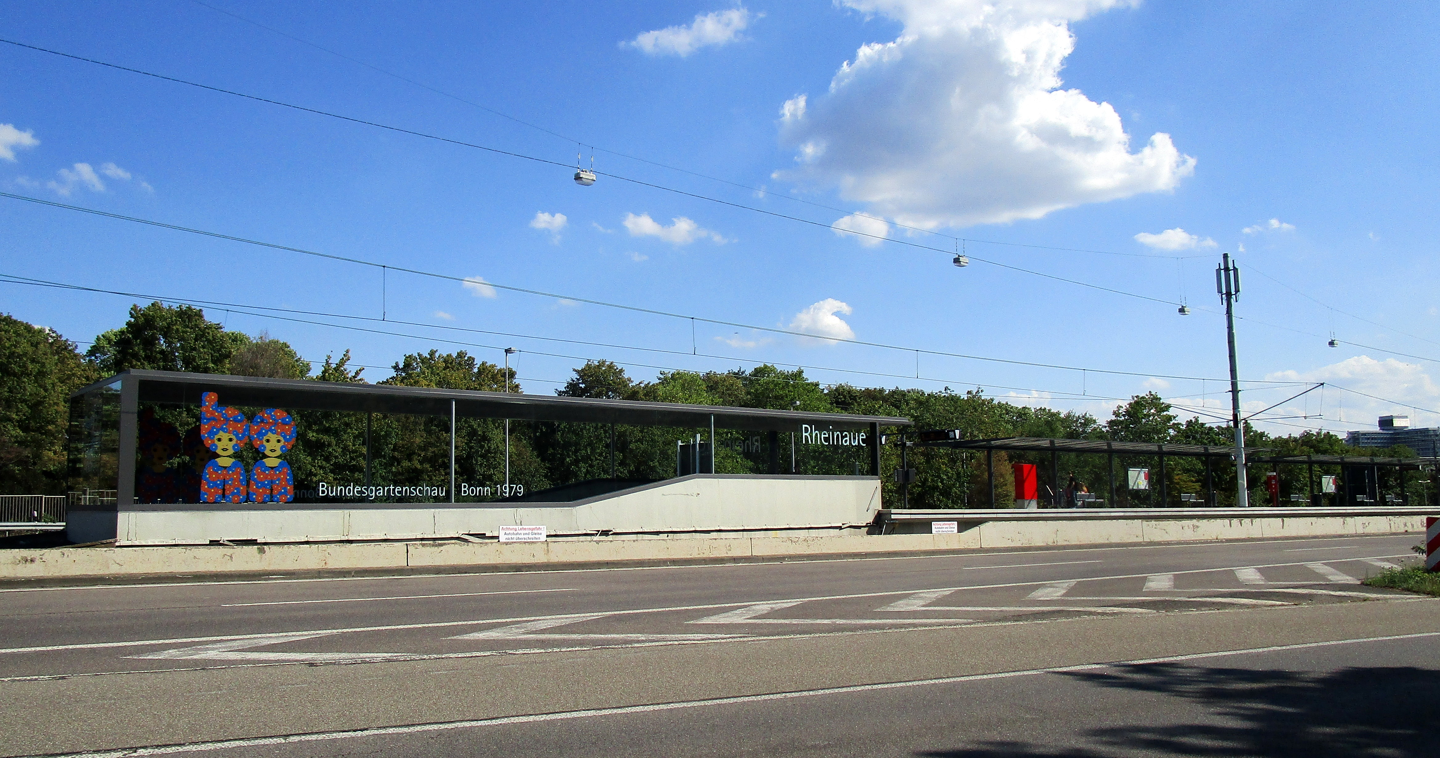 Stadtbahnhaltestelle Rheinaue, Bonn-Gronau/Hochkreuz; im Vordergrund die Bundesautobahn 562